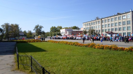 Центр поселка Магдагачи